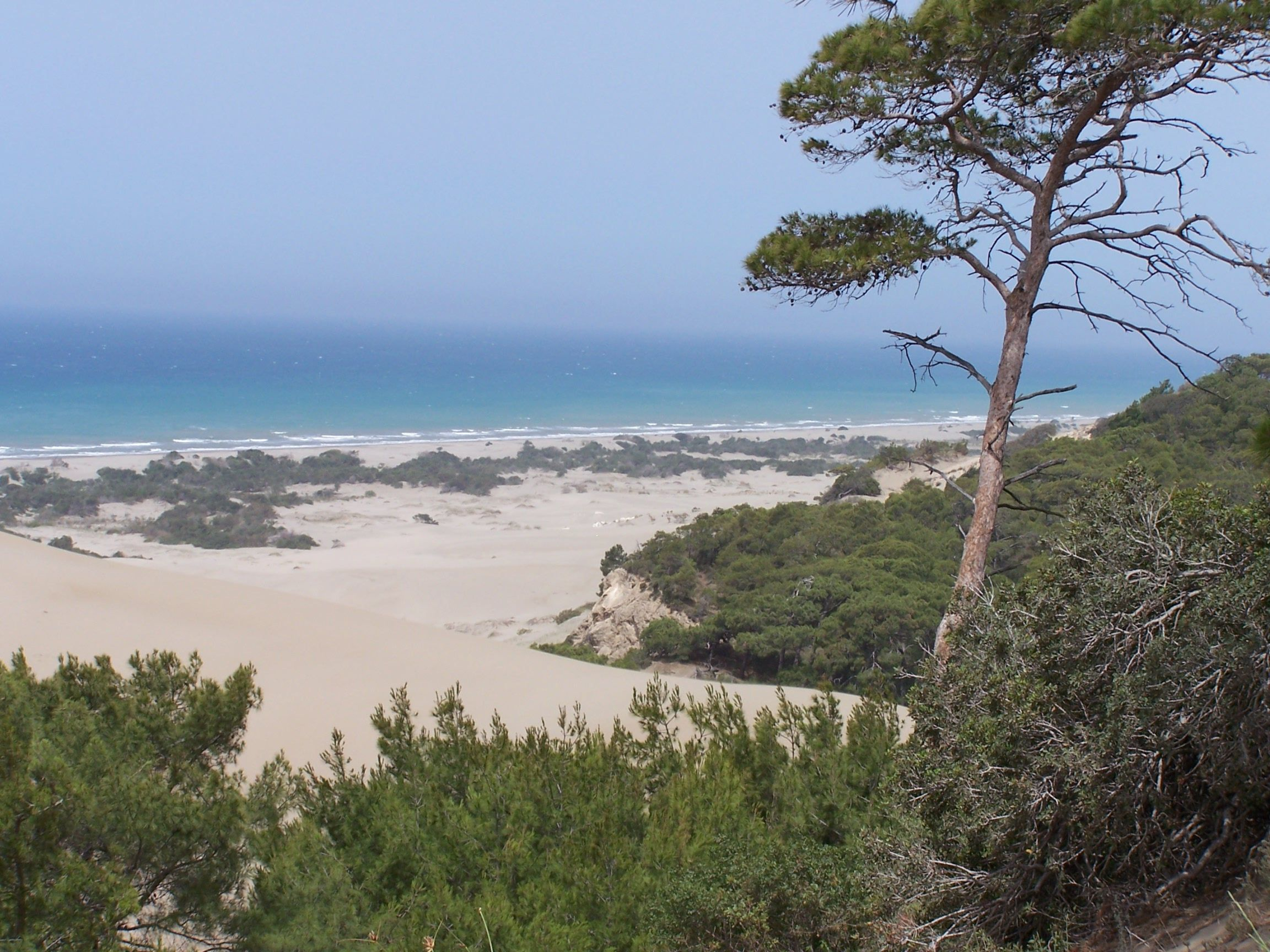 Patara Dünen